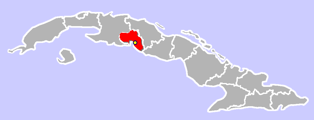 Location of Cienfuegos, Cuba